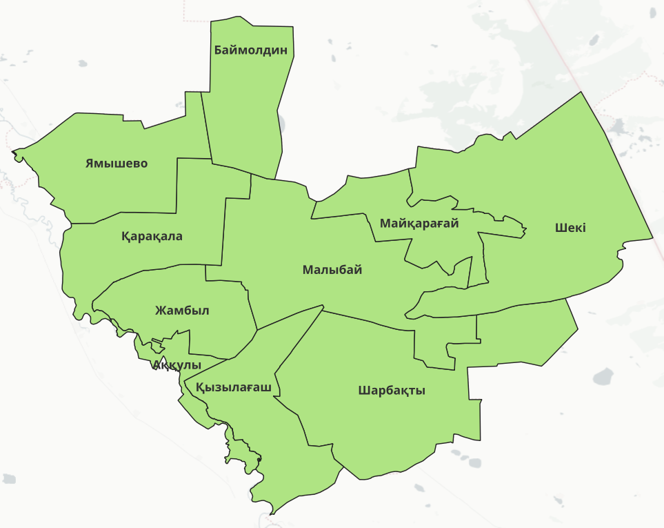 Аккулинський район бланкова карта (АТП району)